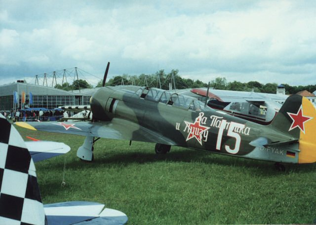 Yakovlev Yak-11 trainer